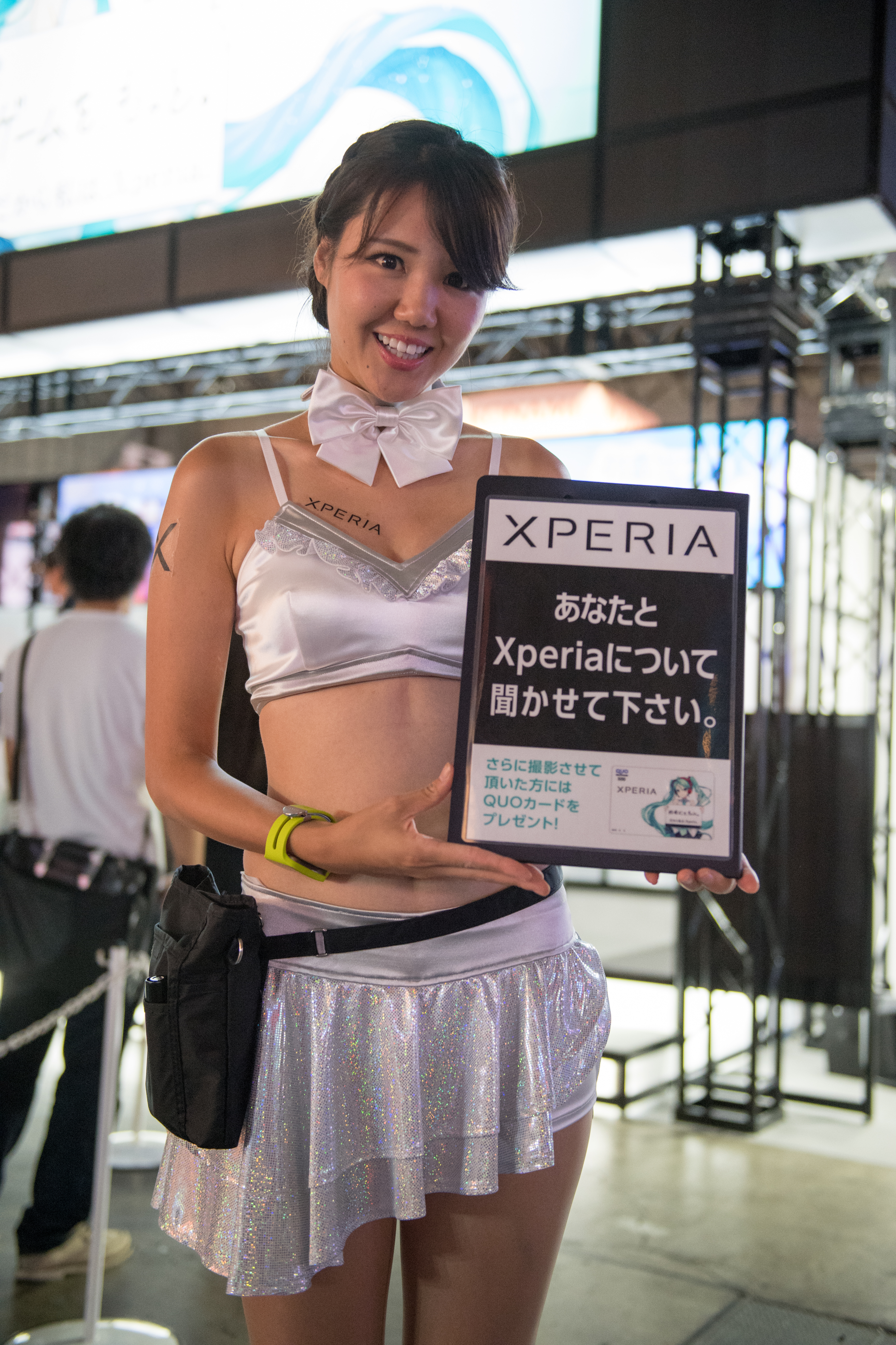 2016東京電玩展，Sony Xperia宣傳模特兒。